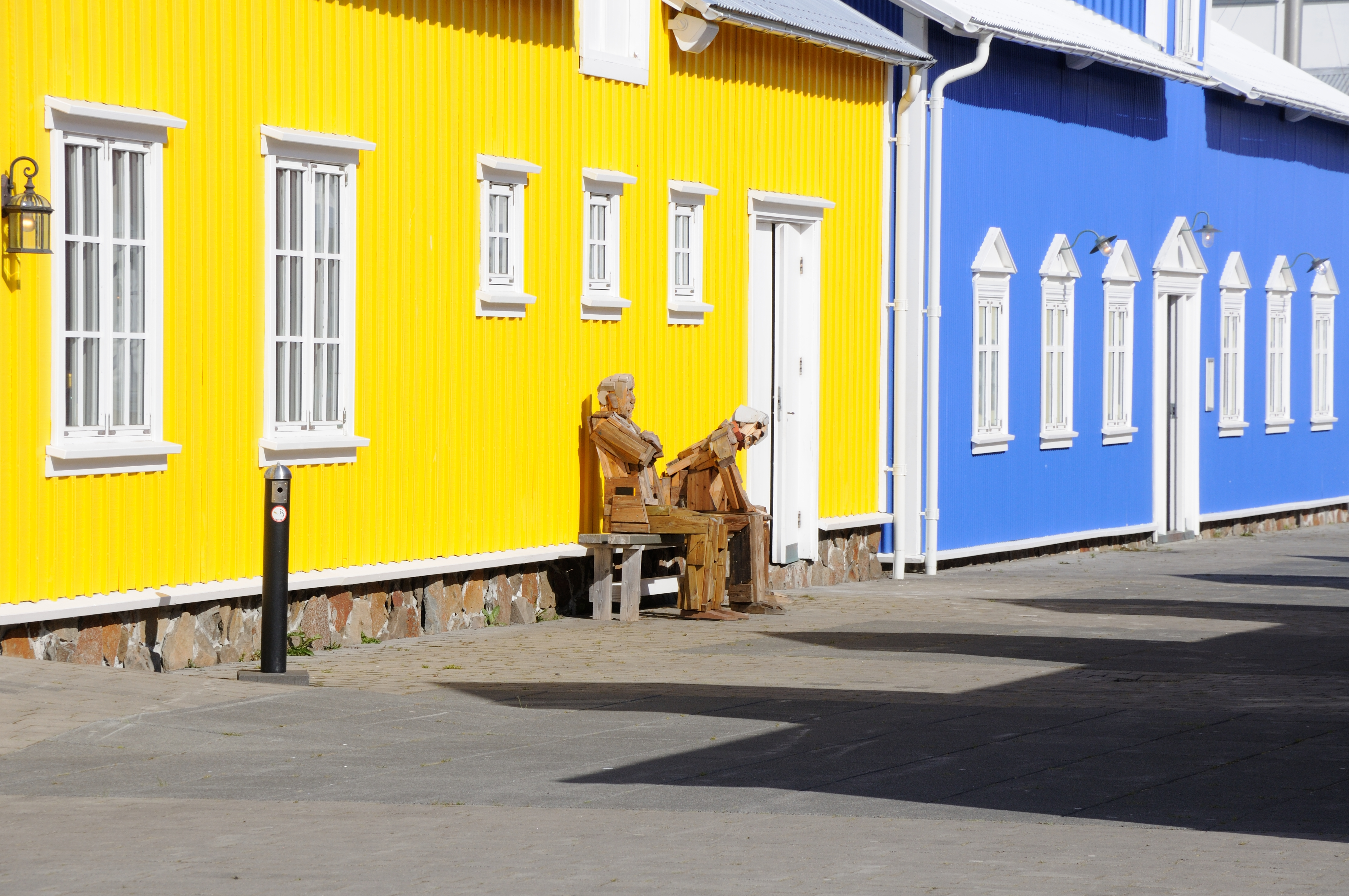 Iceland, Siglufjörður